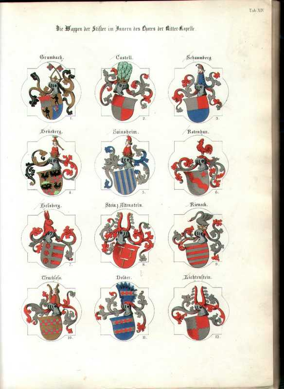 Eine Wappentafel aus dem "Marianischen Ritter-Album" von Carl Alexander Heideloff (Ritterkapelle Haßfurt). Selbst vom Original gescannt, 2004